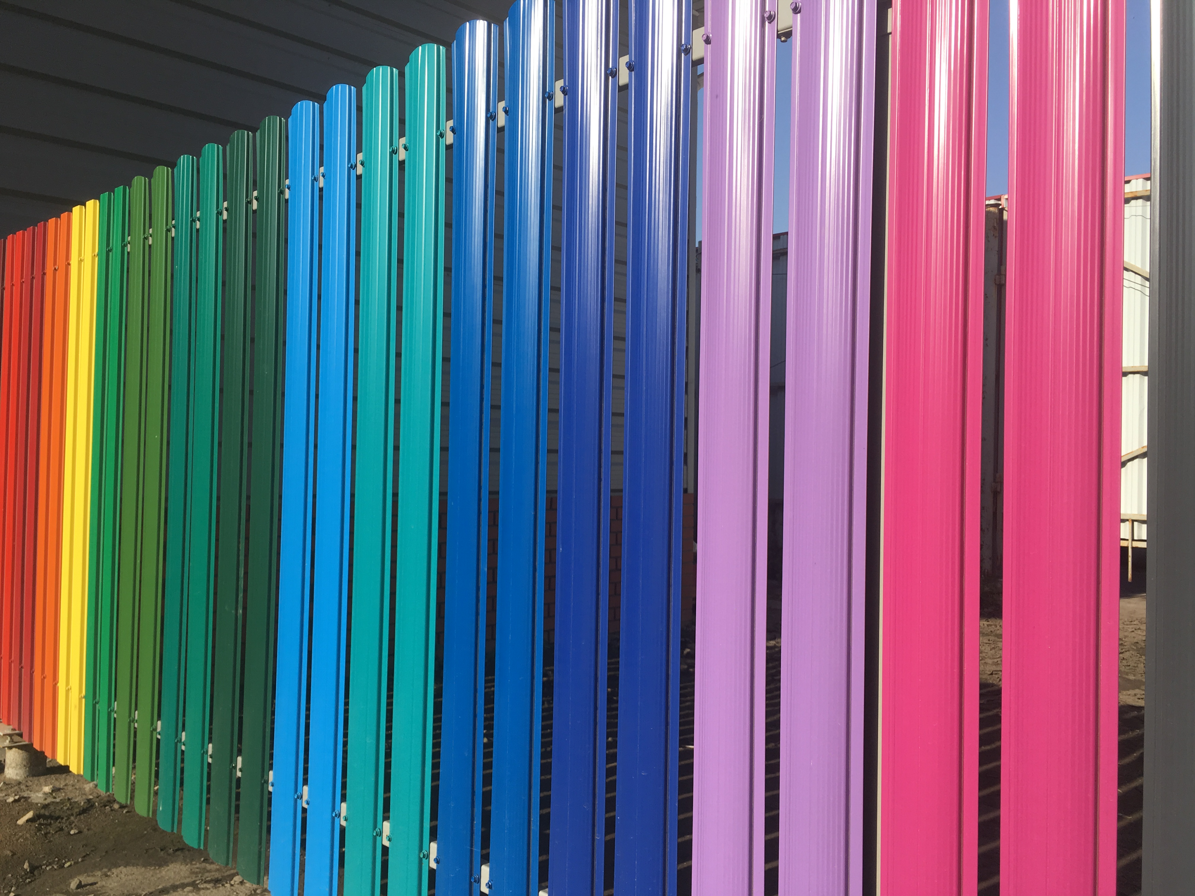 Металлический штакетник для заборов и ограждений (металлоштакет)